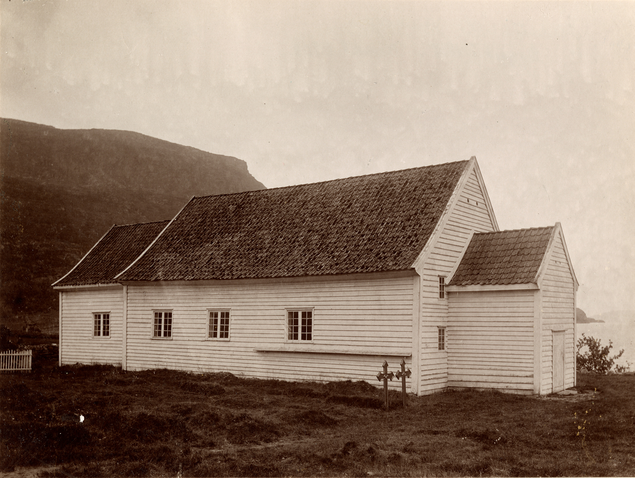 Sandeid gamle kirke, revet 1906 etter å ha blitt avløst av ny kirke i 1904. Foto: Christian Christensen Thomhav.